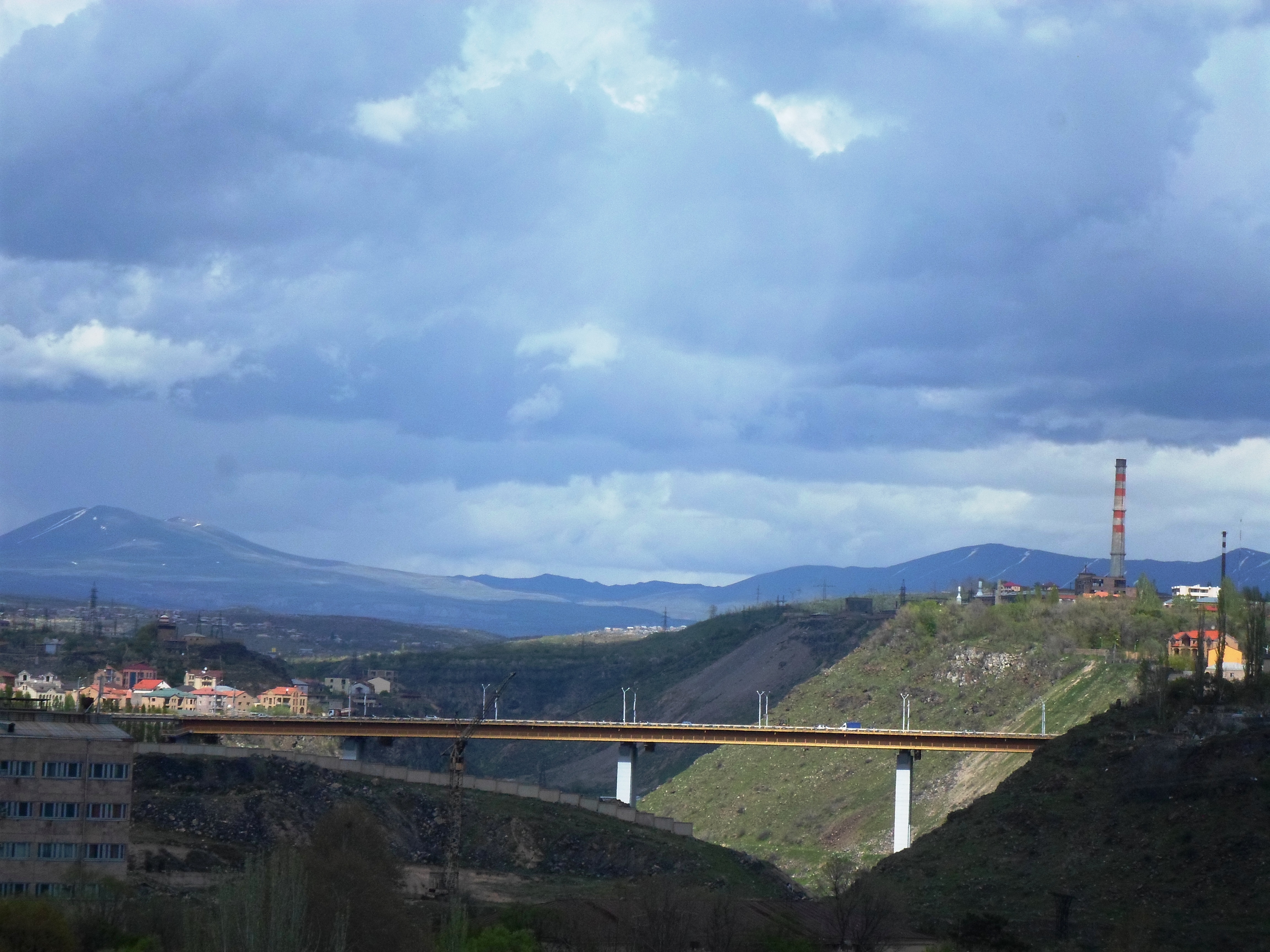 Давташенский мост